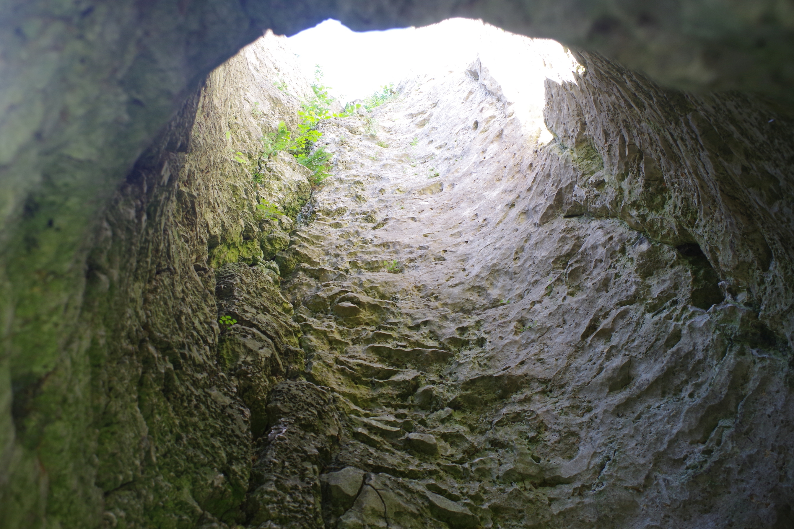 Studnia we wschodniej ścianie skały Studnisko w grupie Skał Mirowskich